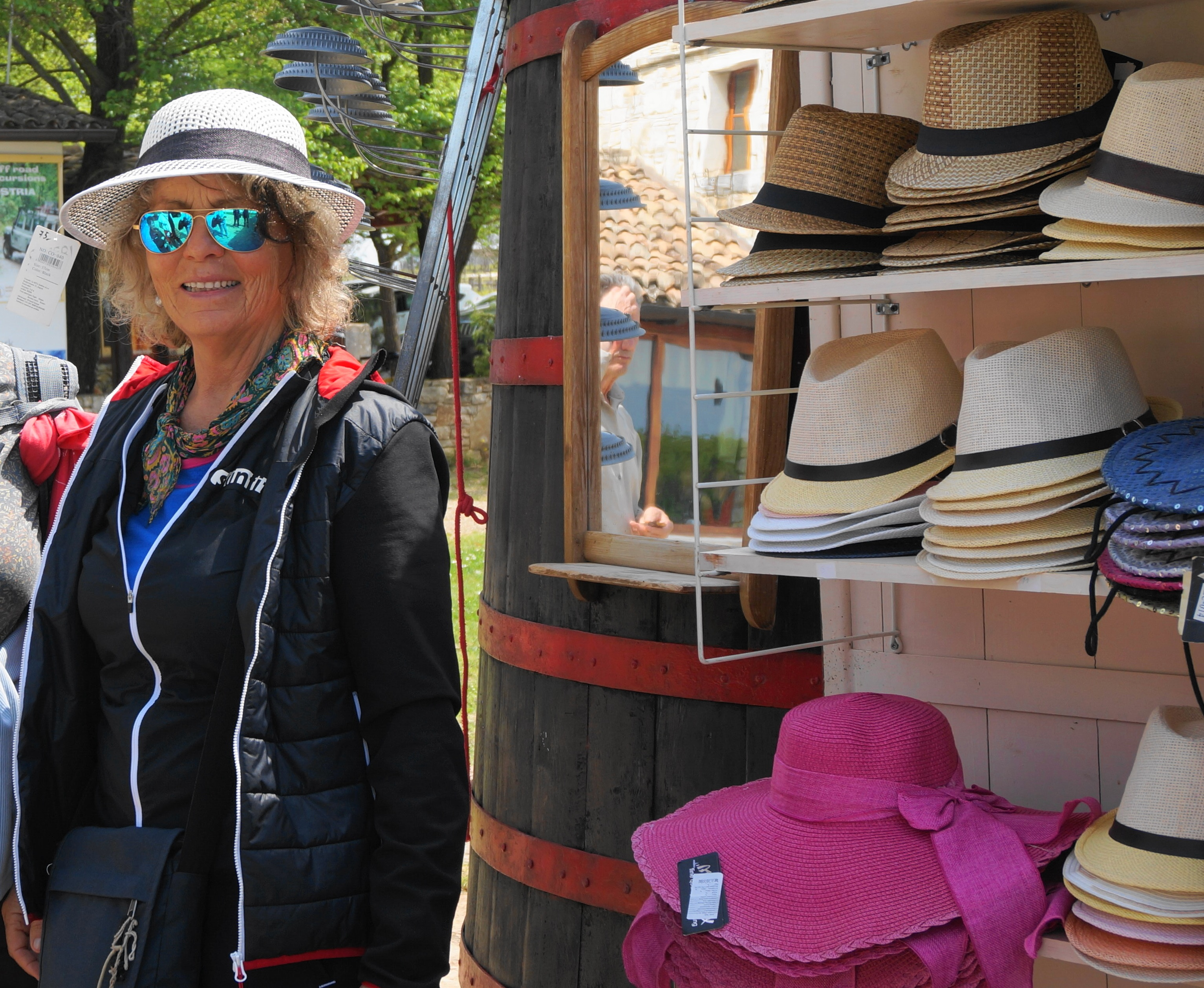 Der Strohhut eignet sich nicht nur als Kopfbedeckung. Dieser ist auch ein geeigneter Sonnenschutz und Schattenspender.